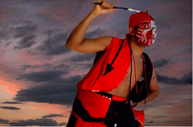 Arta bildigo de Elegua